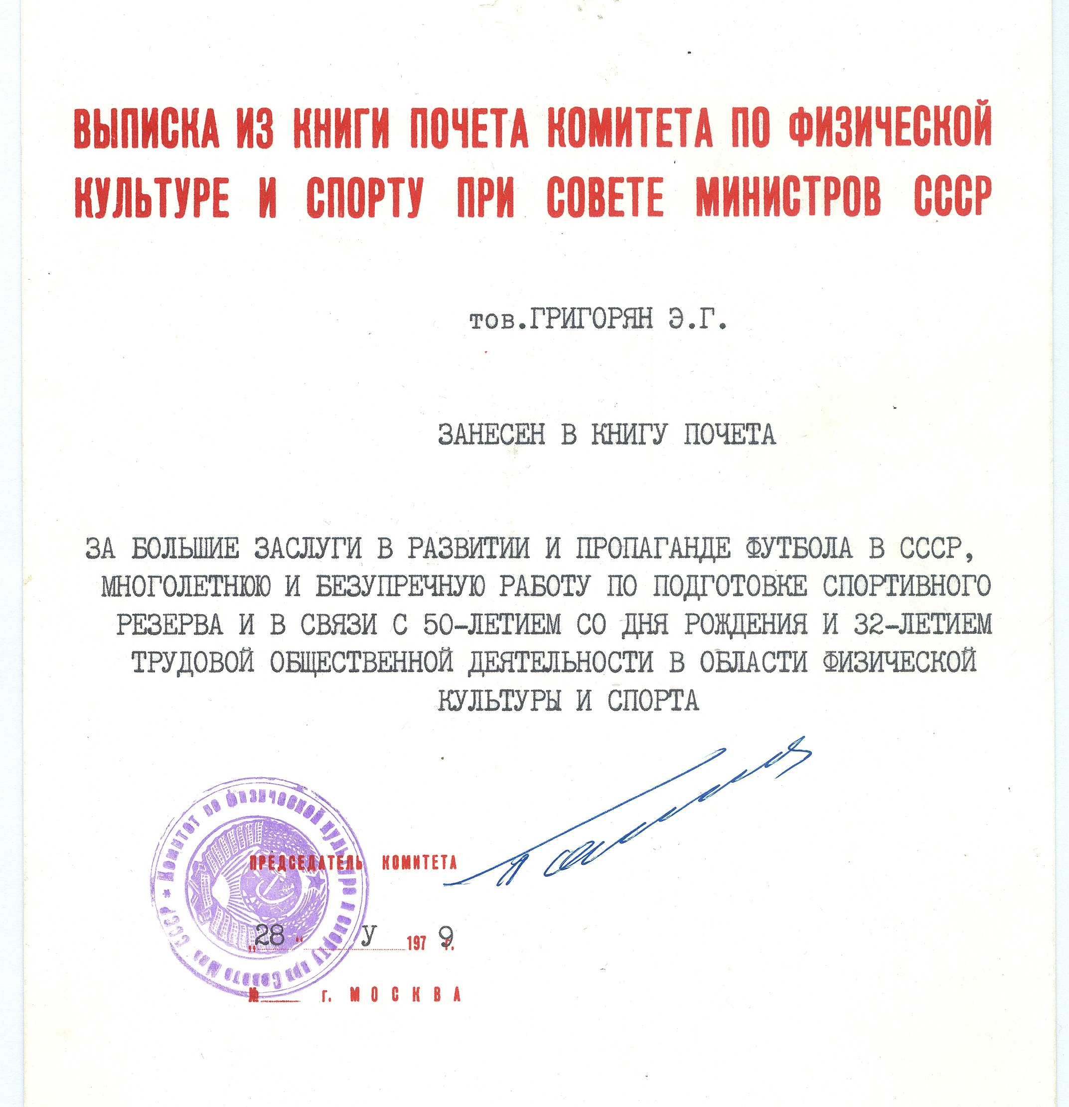 Выписка из книги почёта комитета по физической культуре и спорту Совета Министров СССР